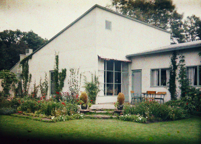 Stockholmsutställningen 1930 Villa 48, arkitekt Hakon Ahlberg